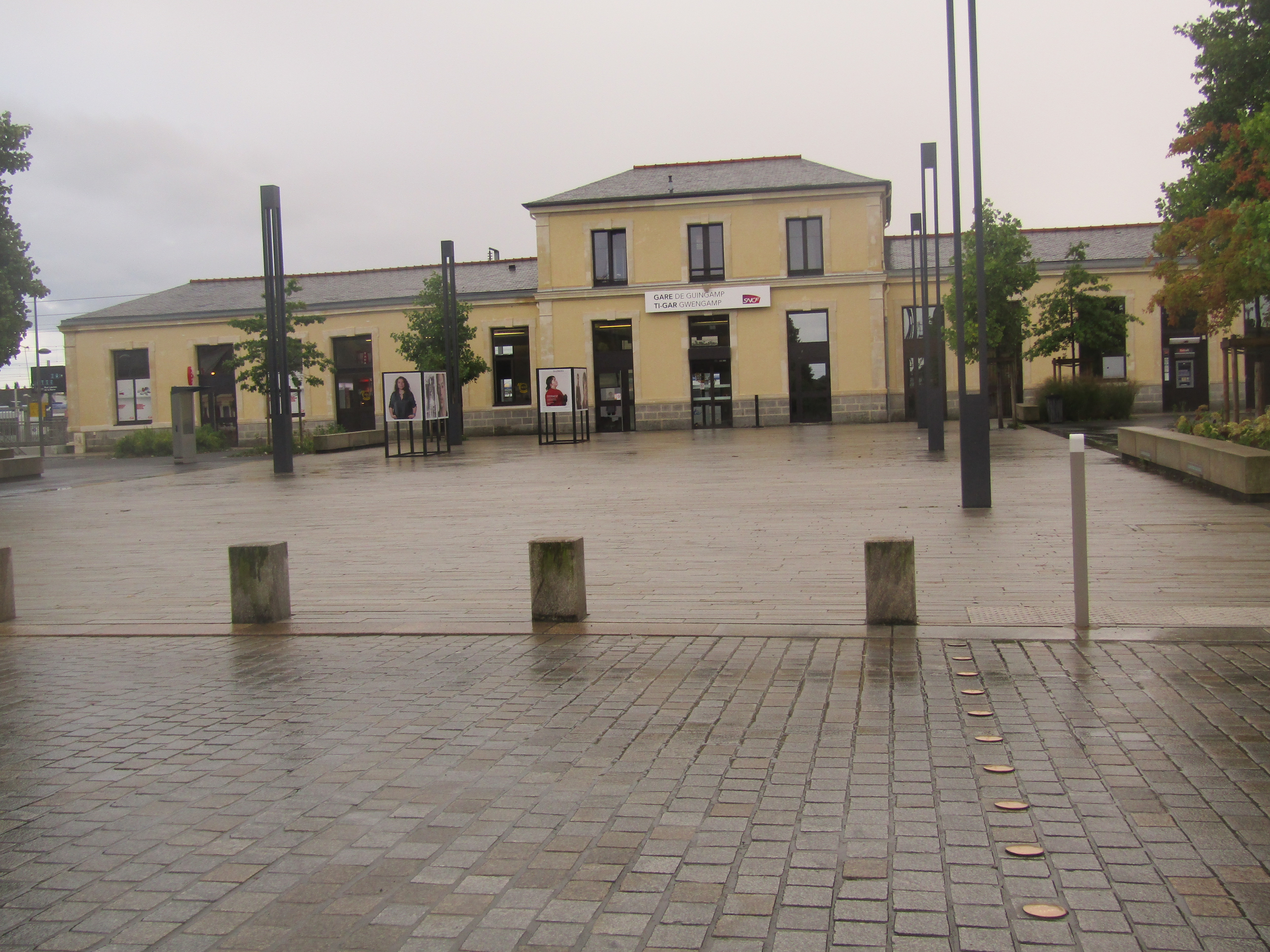 L'ensemble du BV de la gare de Guingamp en septembre 2017